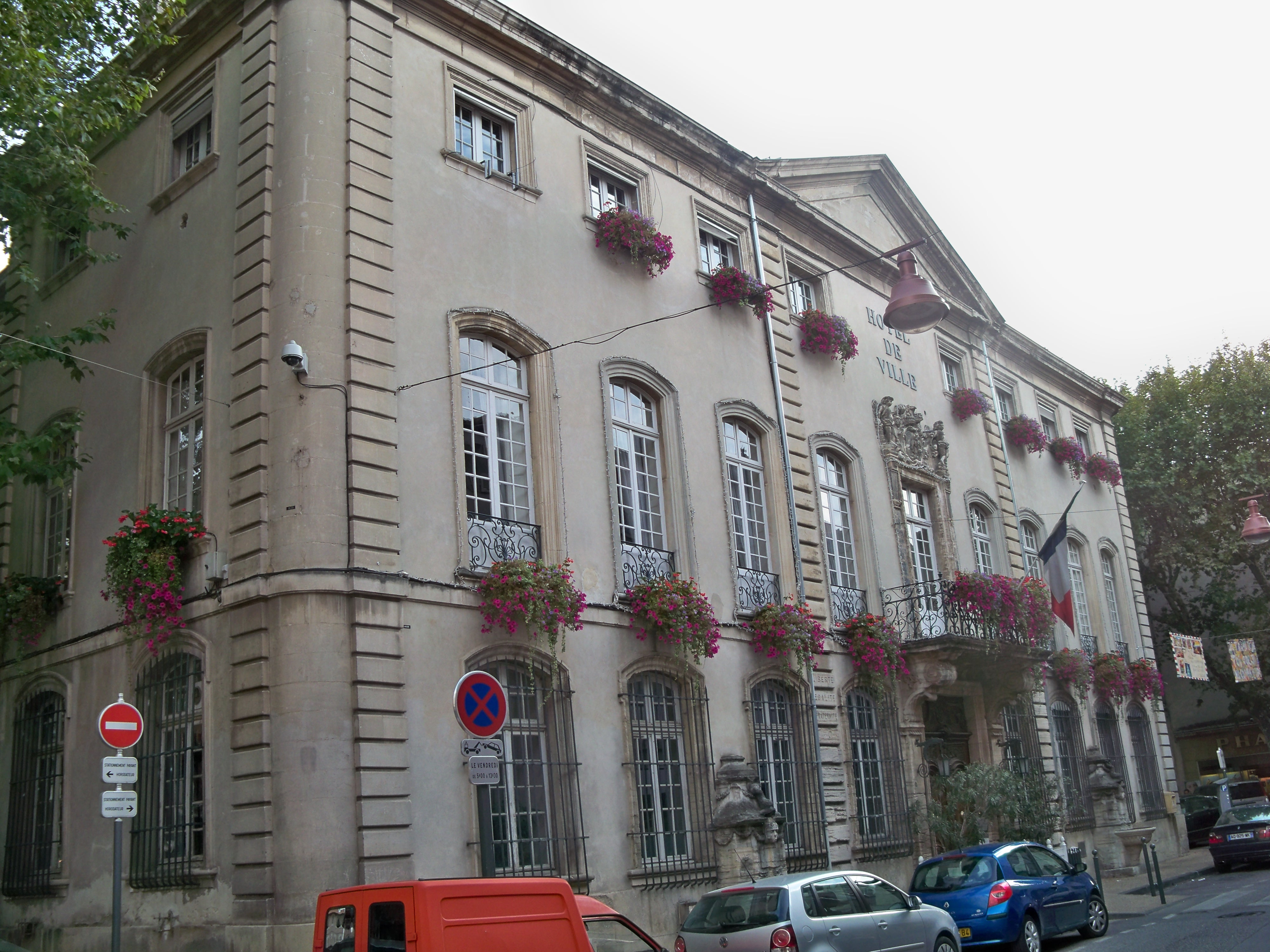 Facade de l'Hotel de Ville de Carpentras, Vaucluse, France